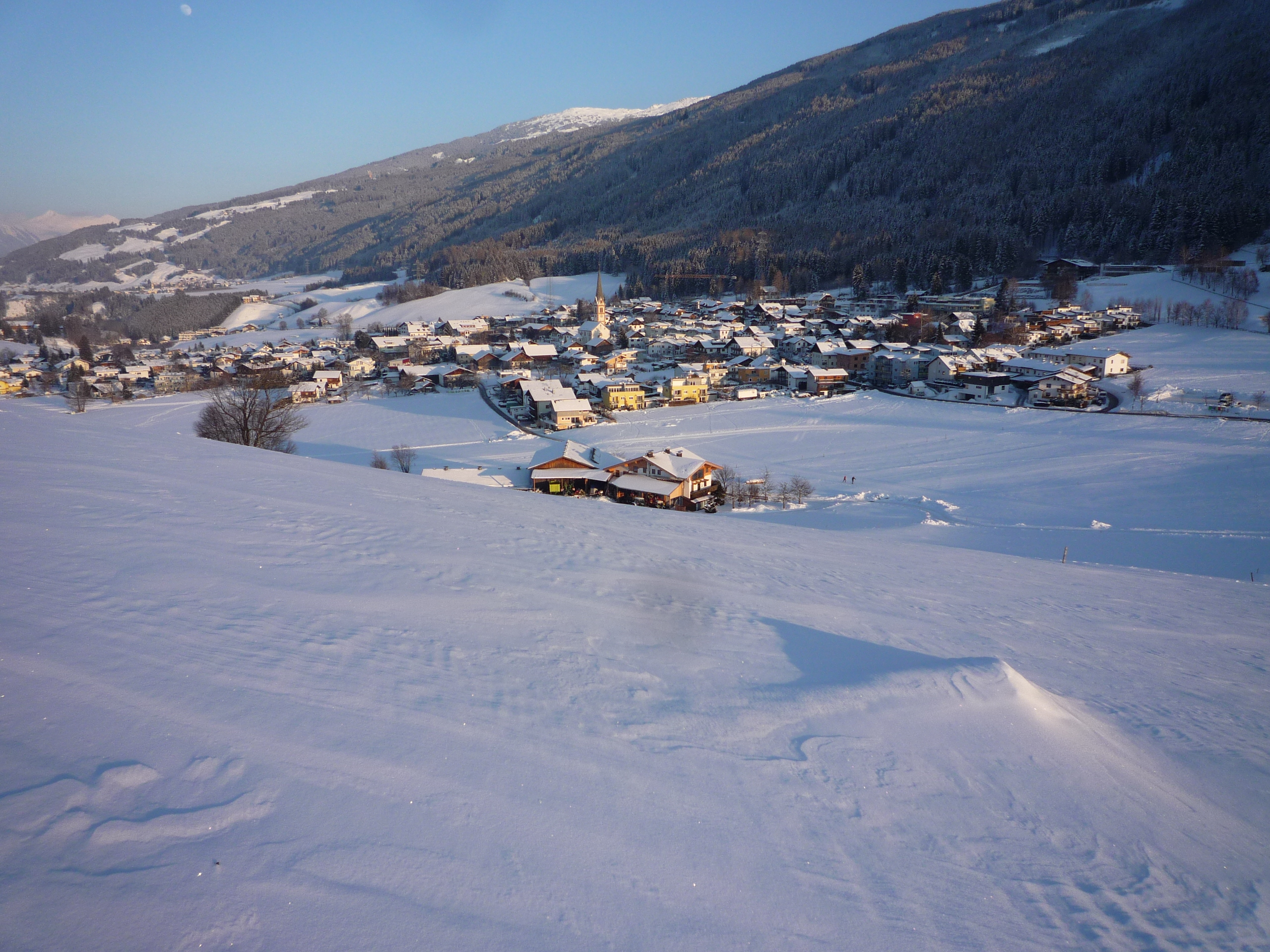 Rinn vom Rinner Bichl aus fotografiert, Februar 2012